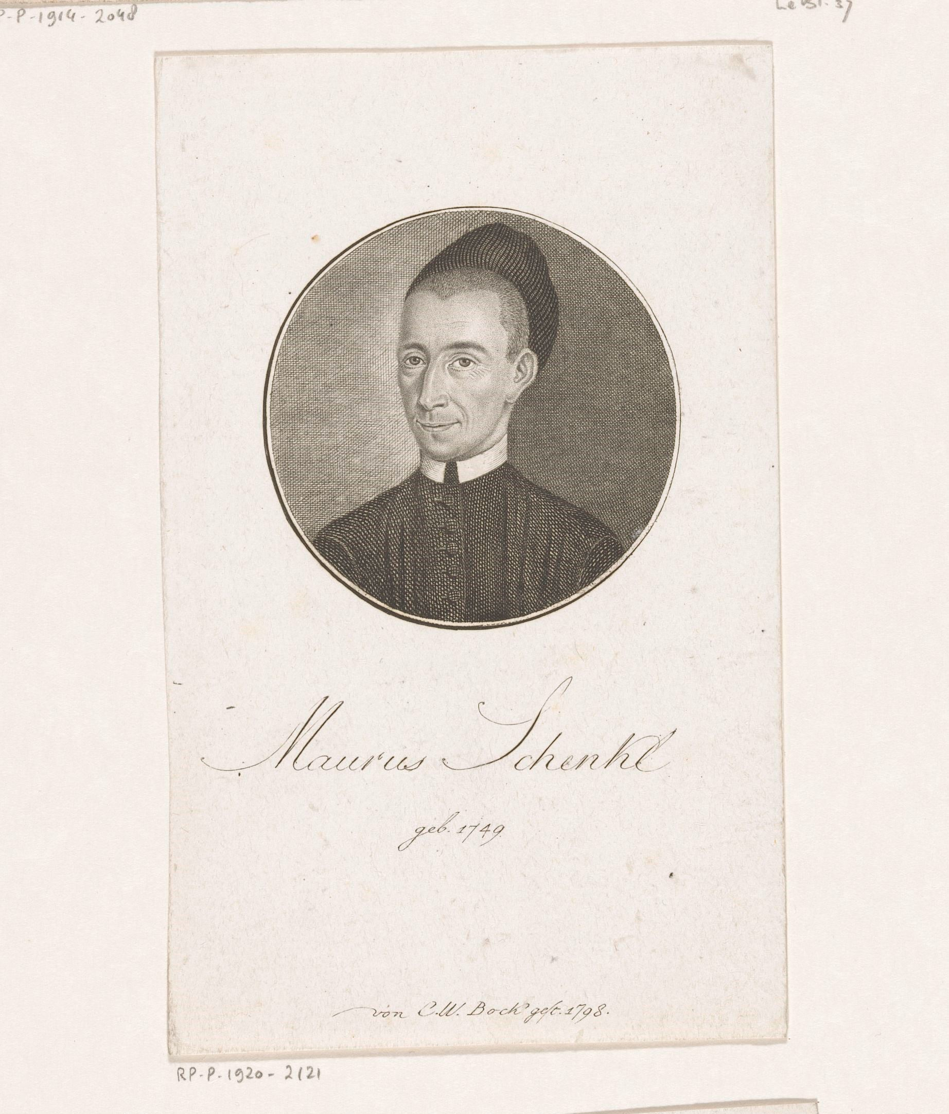 IdentificatieTitel(s): Portret van Maurus SchenklObjecttype: prent Objectnummer: RP-P-1920-2121Catalogusreferentie: HAB A 27947Opschriften / Merken: verzamelaarsmerk, verso, gestempeld: Lugt 2228VervaardigingVervaardiger: prentmaker: Christoph Wilhelm Bock (vermeld op object)Plaats vervaardiging: NeurenbergDatering: 1798Materiaal: papier Techniek: graveren (drukprocedé) / etsen / stippelwerkAfmetingen: blad: h 153 mm (binnen de plaatrand afgesneden) × b 95 mm (binnen de plaatrand afgesneden)OnderwerpWat: historical personsWie: Maurus SchenklVerwerving en rechtenVerwerving: aankoop 1905Copyright: Publiek domein